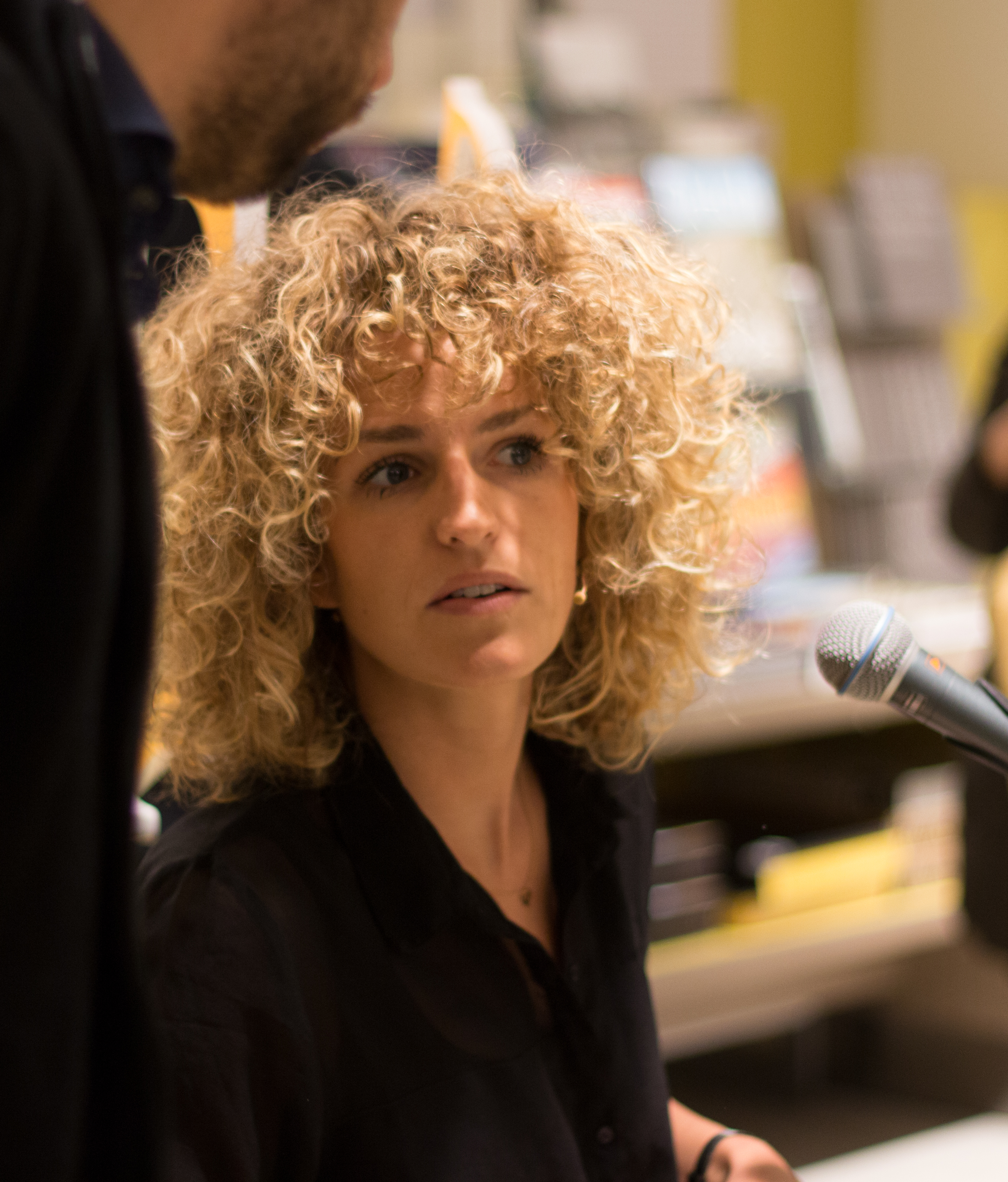 Carolien Borgers